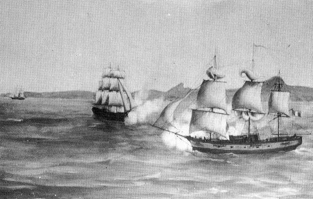 gravure du XIXème siècle représentant le combat de Malpelo